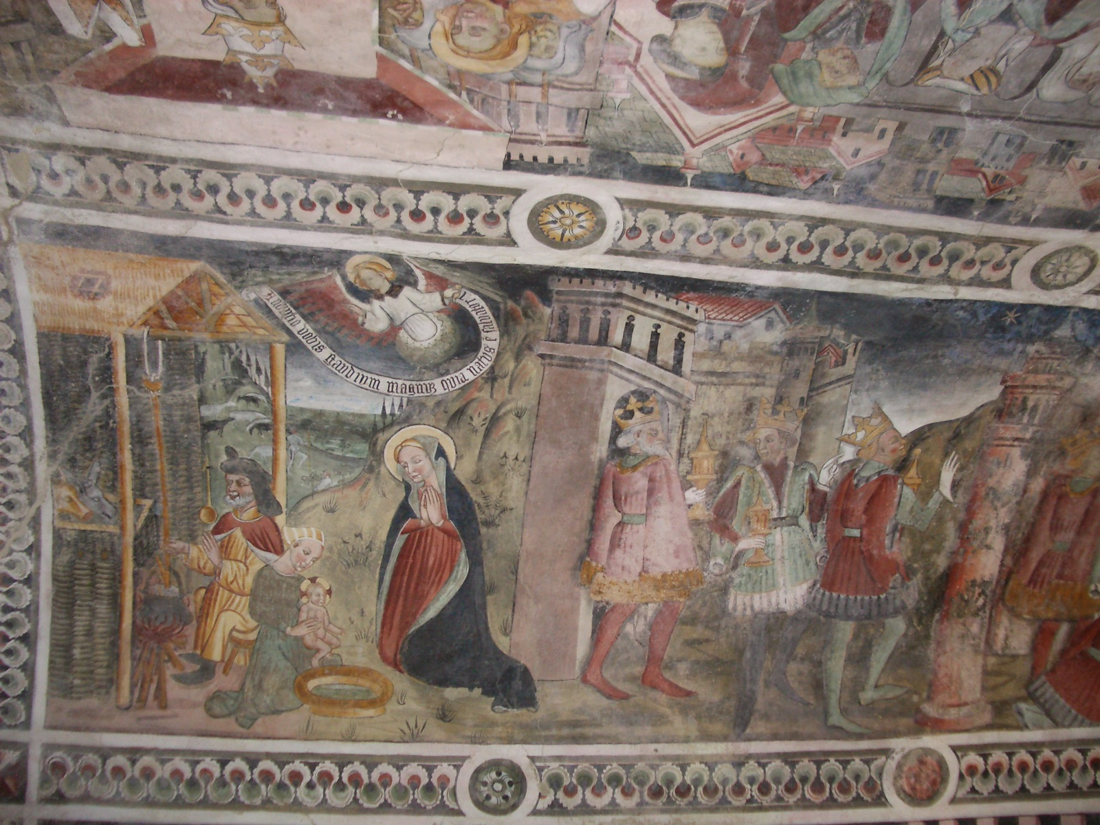 Chapelle Saint Sebastien, Fresques de Giovanni Baleison, Marmora, Maira Valley, Italy